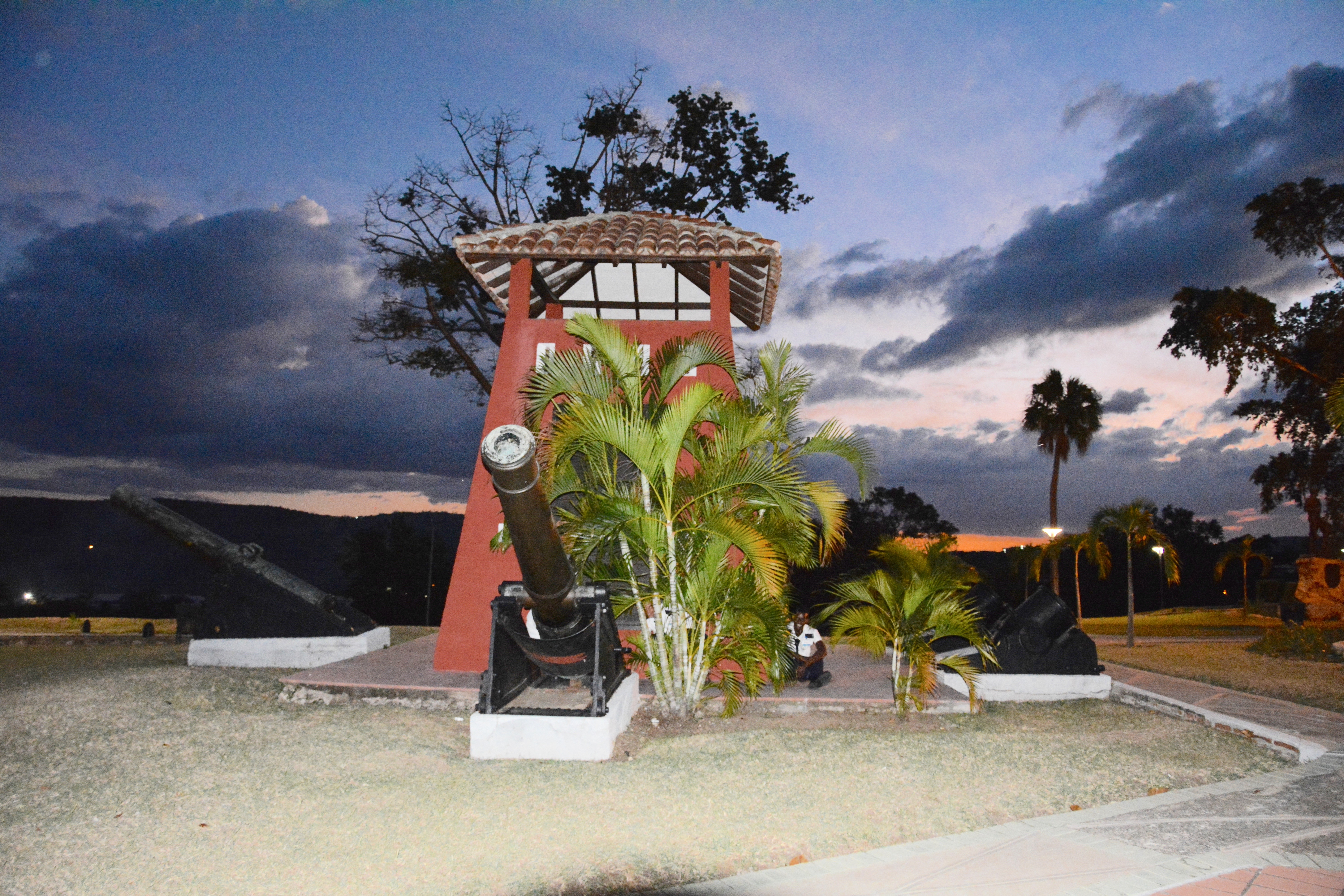 Loma San Juan in Santiago de Cuba